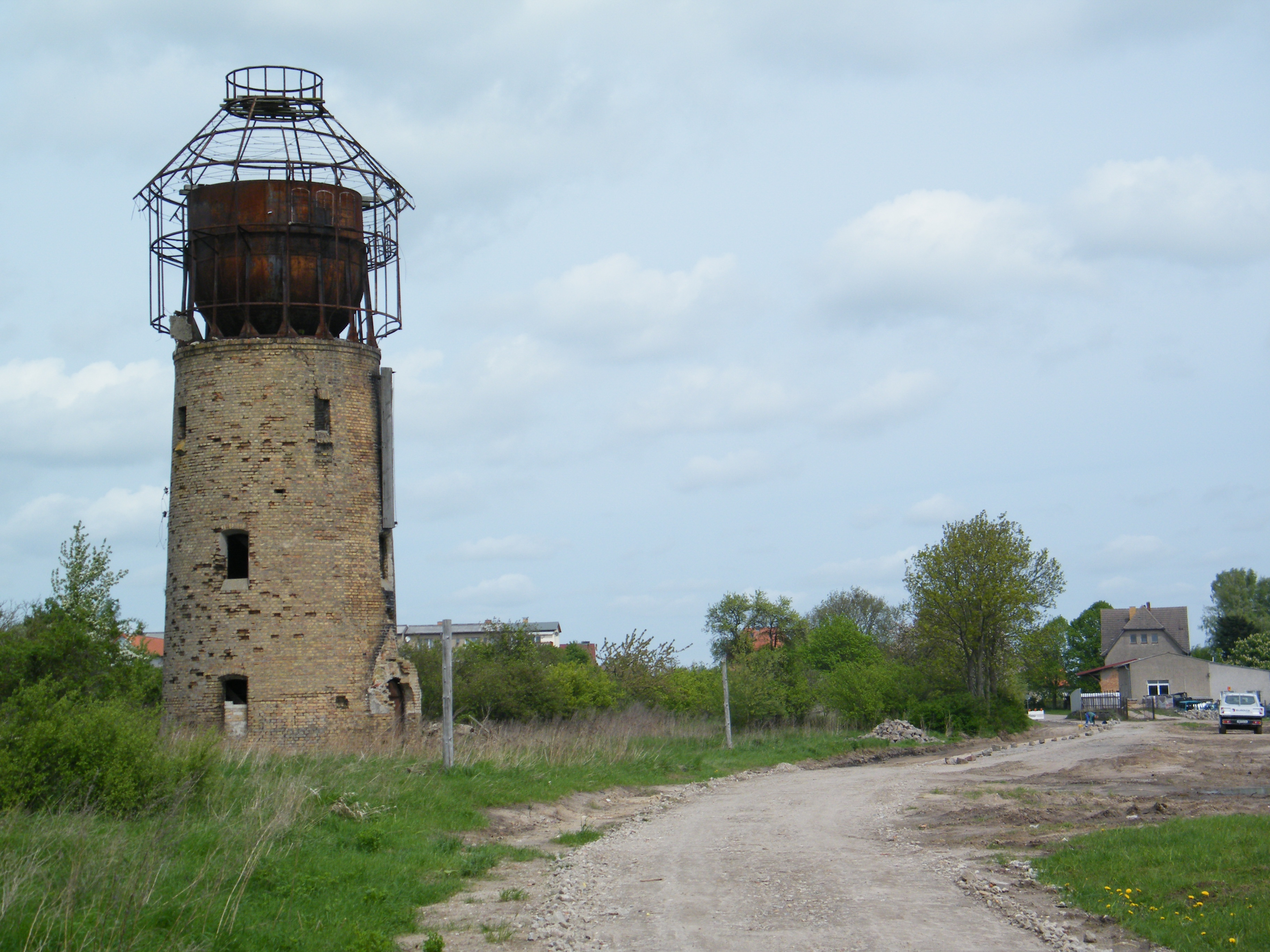 Bahnstrecke Fährkrug–Fürstenwerder, Wasserturm Fürstenwerder